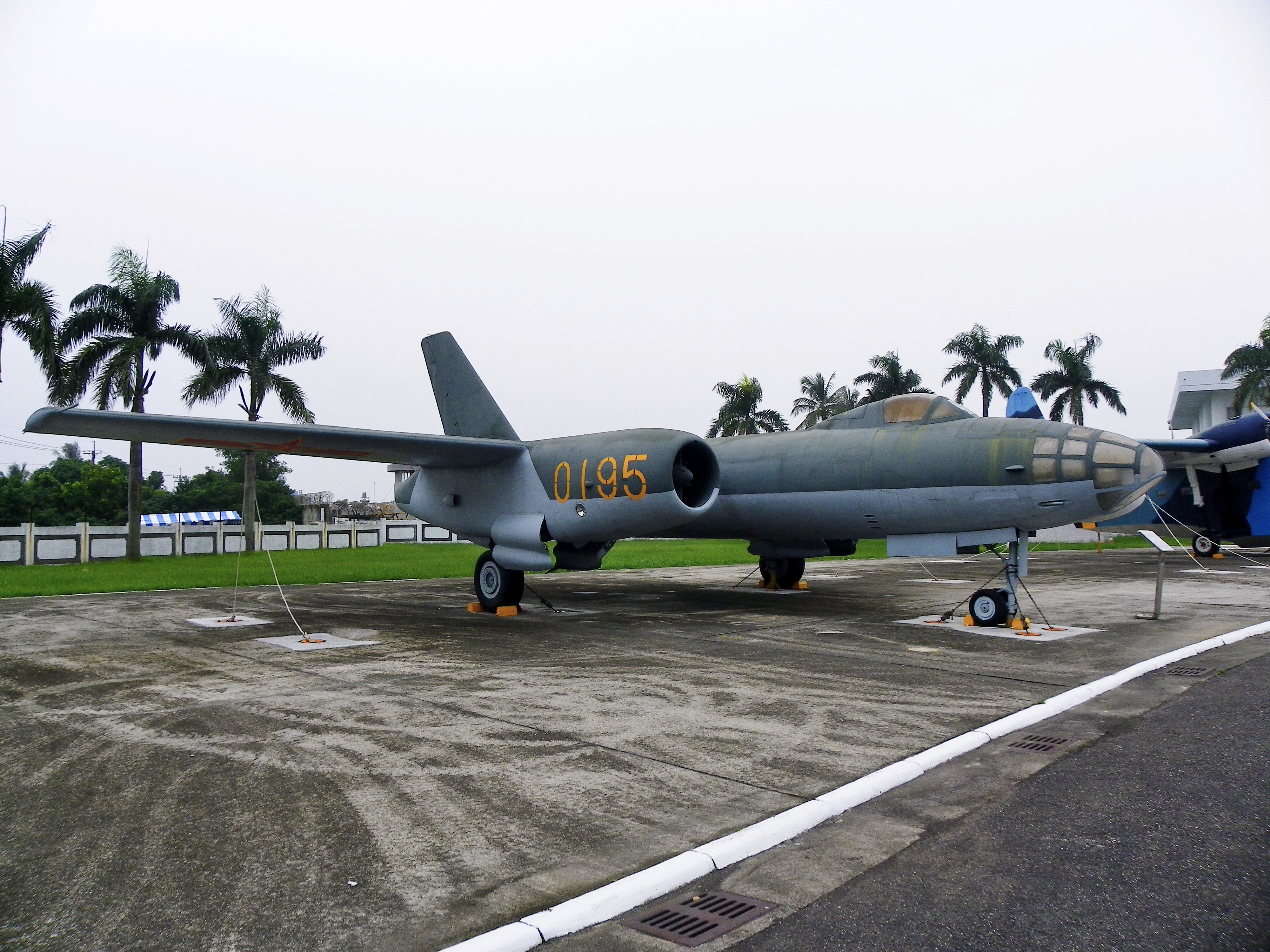 1965年11月11日，李顯斌、李才旺、廉保生自浙江筧橋機場駕機來歸之IL-28小獵犬式輕轟炸機。